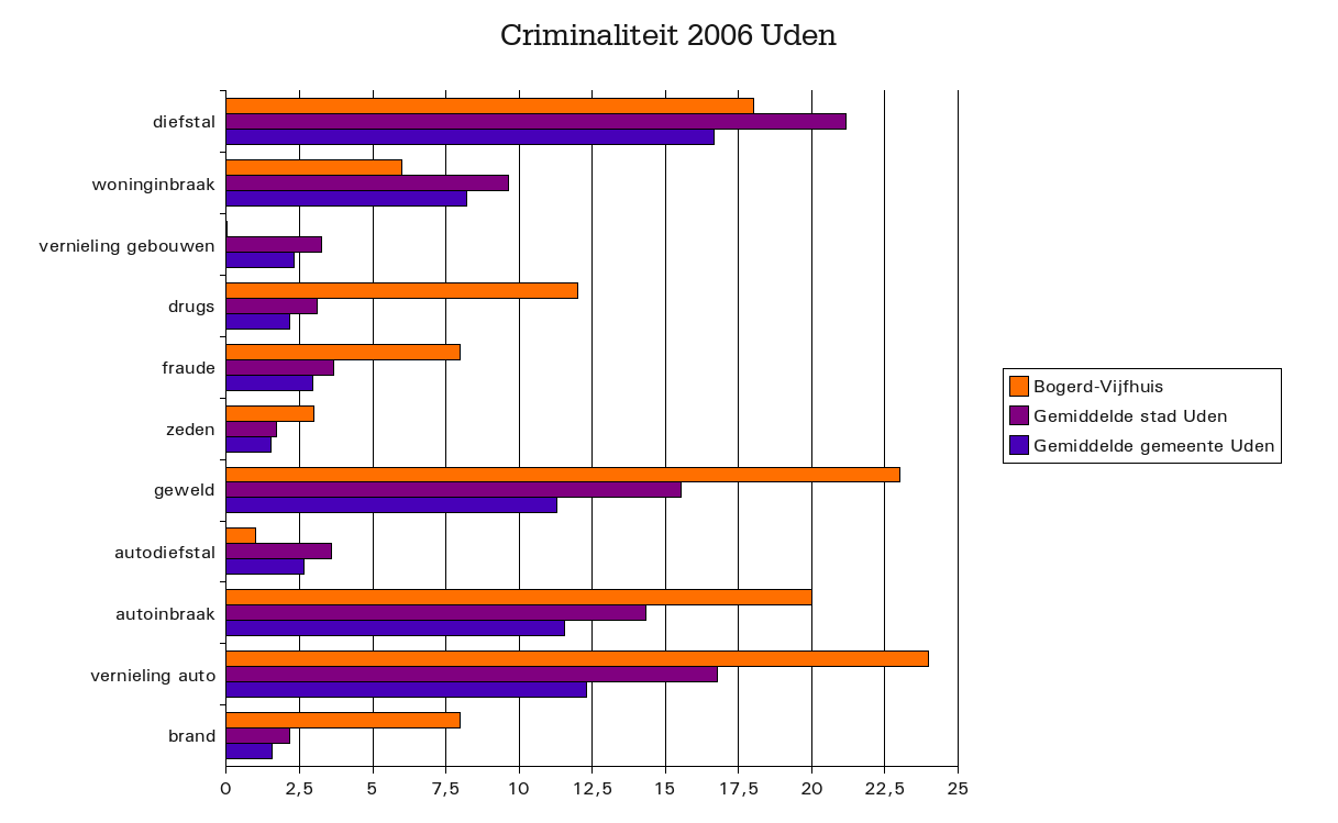 Criminaliteitcijfers in Uden Bogerd-Vijfhuis (2006), Noord-Brabant, The Netherlands